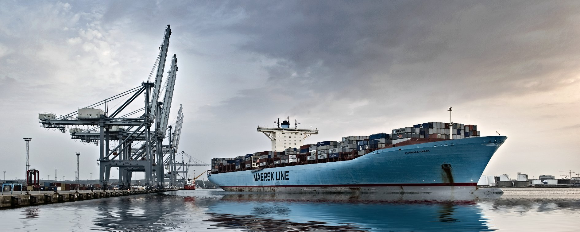 Eleonora Maersk in Aarhus